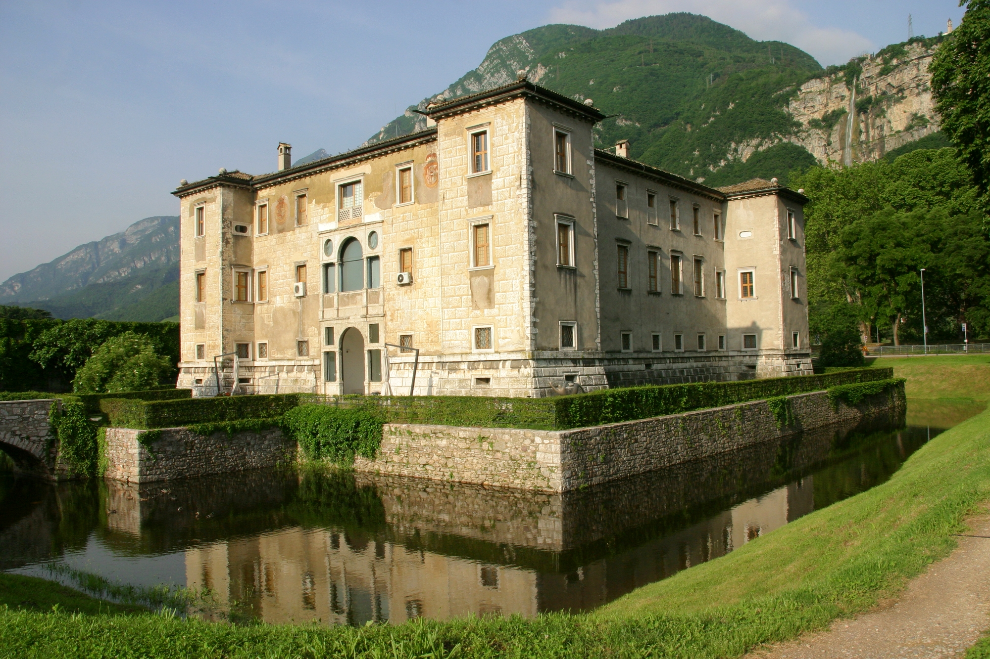 Palazzo delle Albere This is a photo of a monument which is part of cultural heritage of Italy.